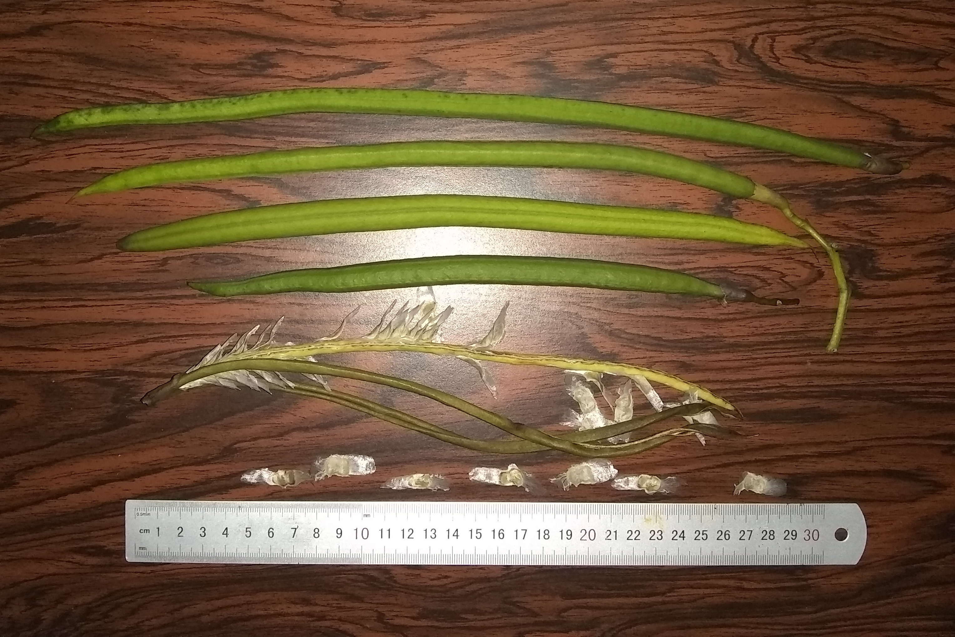 Vainas y Semillas de Apamate (Tabebuia rosea). Ciudad de Acarigua, Estado Portuguesa, Venezuela.